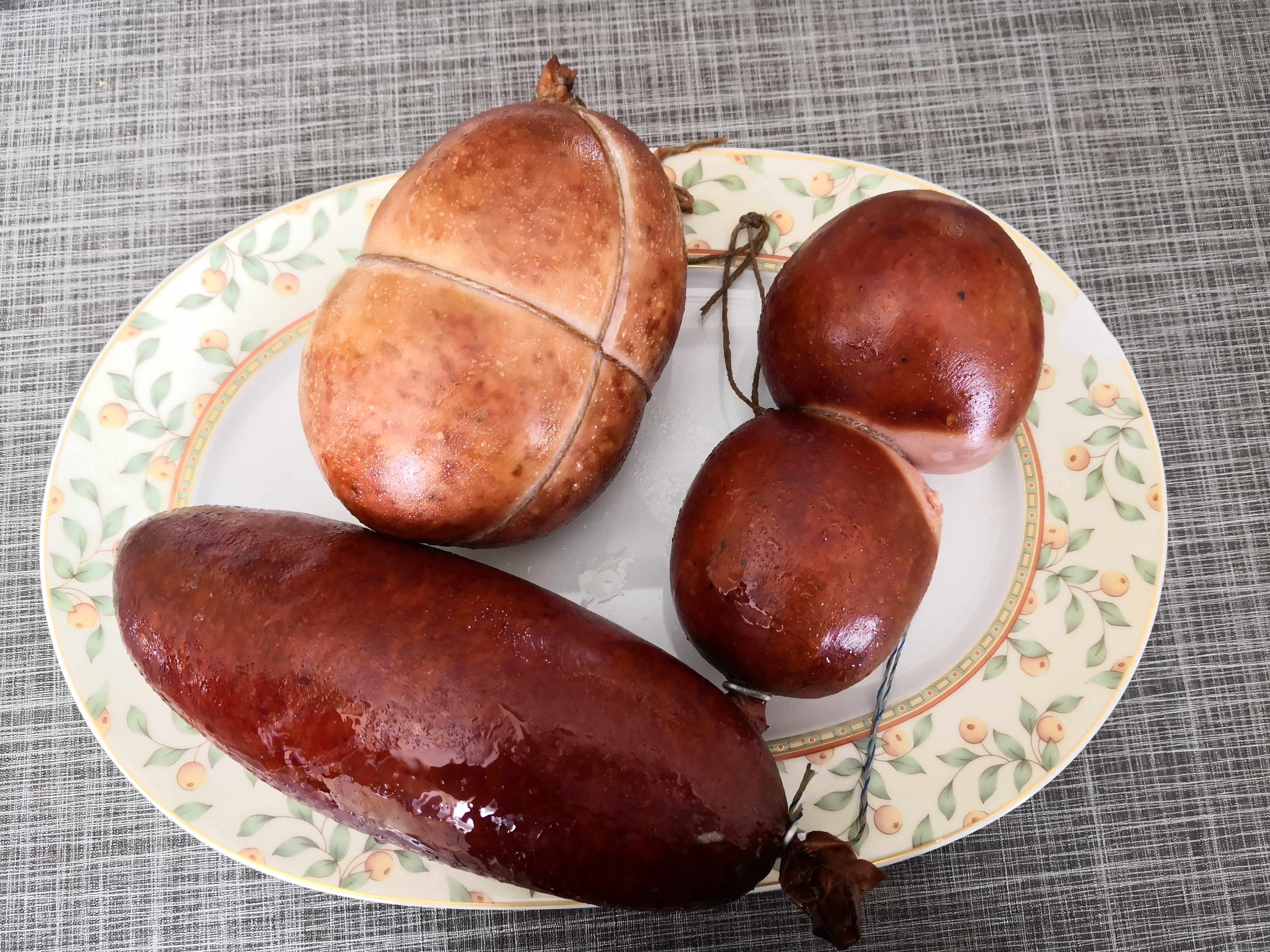 Flurgönder ist ein traditionelles Wurstgericht aus Schwartenmagen, welches zu Himmelfahrt und Fronleichnam gegessen wird.